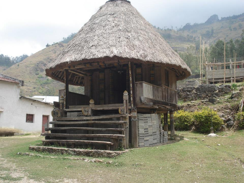 Na estrada entre Aileu e Dili